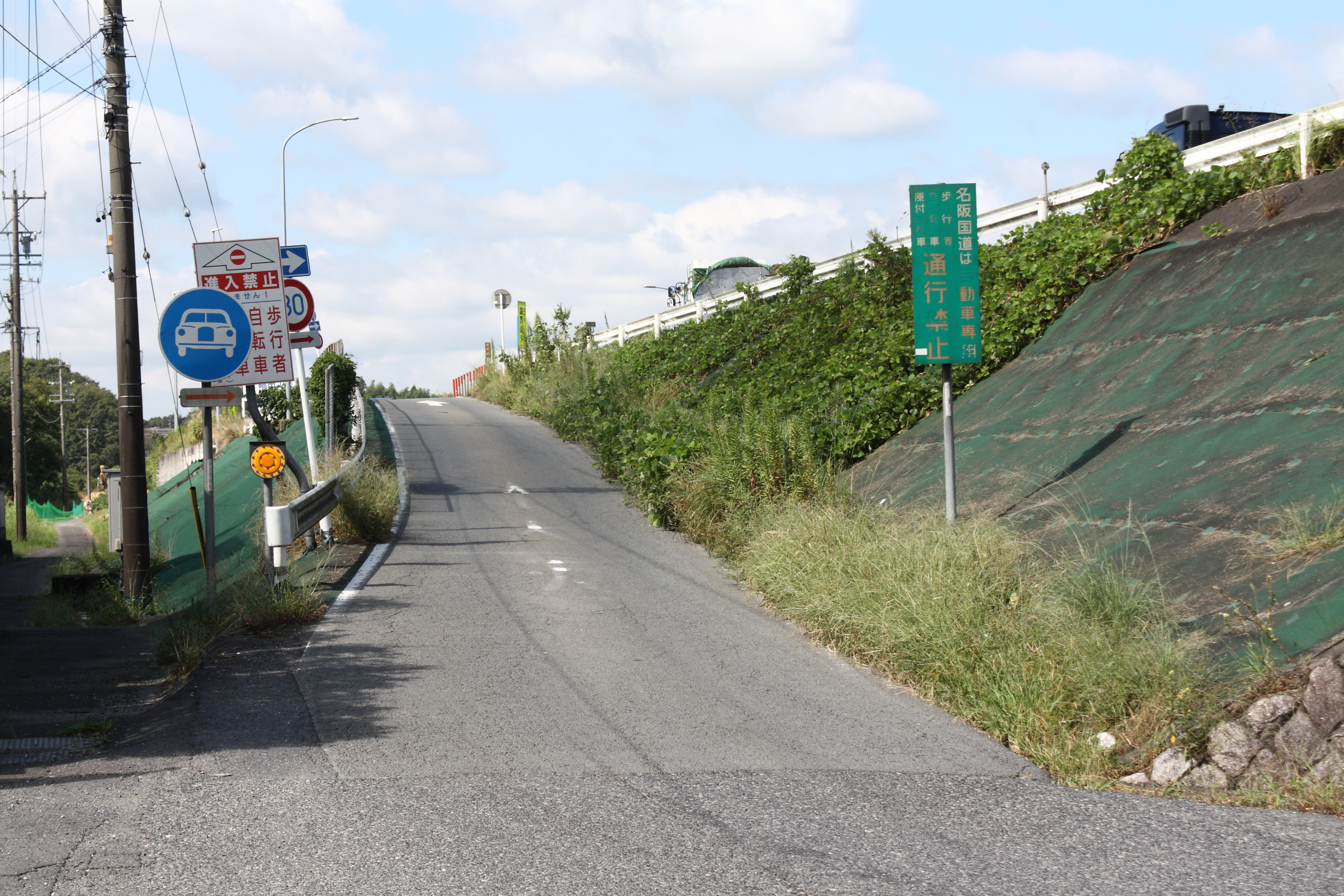 名阪国道 大内インターチェンジ（ダイヤモンド型） 天理方面入口 三重県伊賀市大内